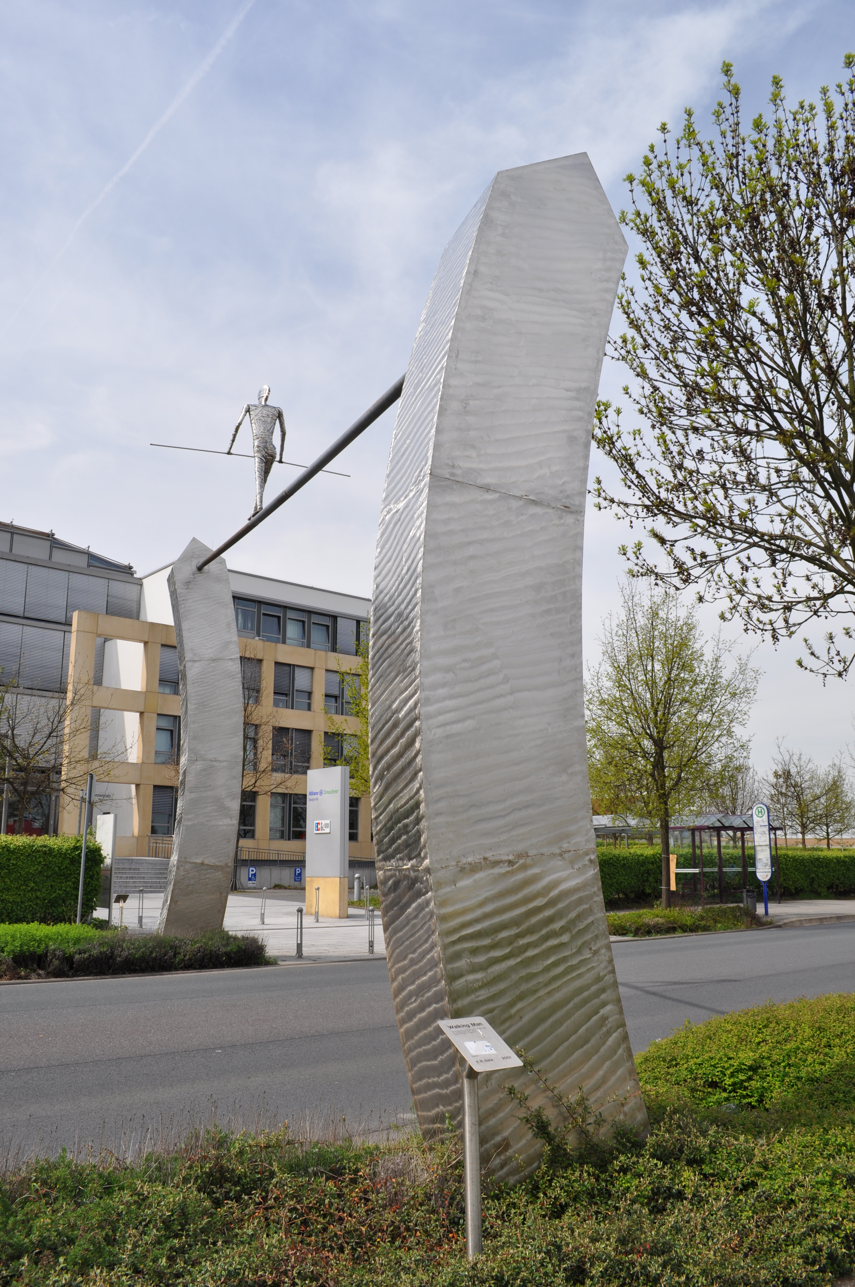 Skulptur "Walking Man" von E. R. Nele in Dortelweil. Das Edelstahl-Kunstwerk stammt aus dem Jahr 2001